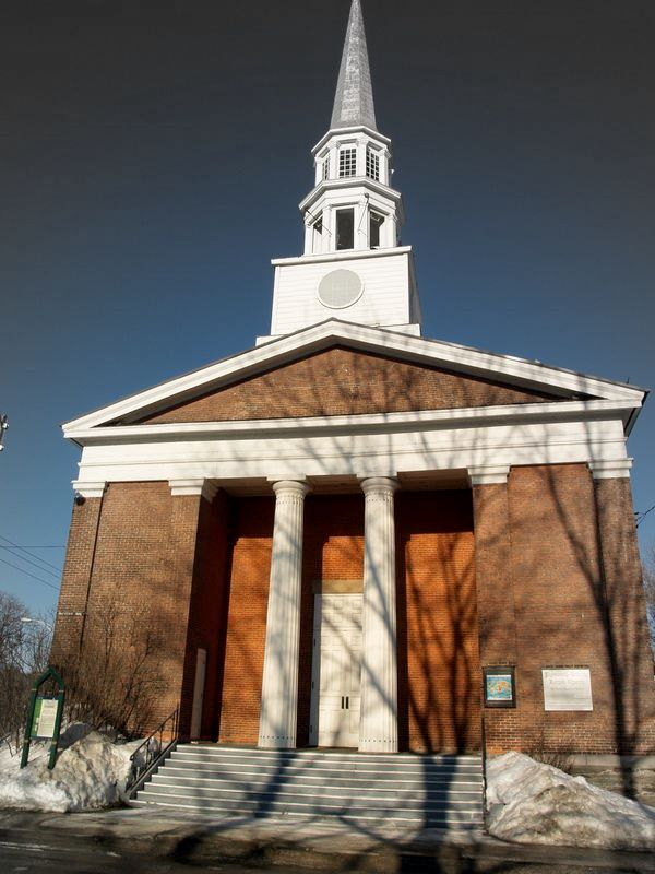 L'Église Plymouth Trinity sur la rue Dufferin à Sherbrooke